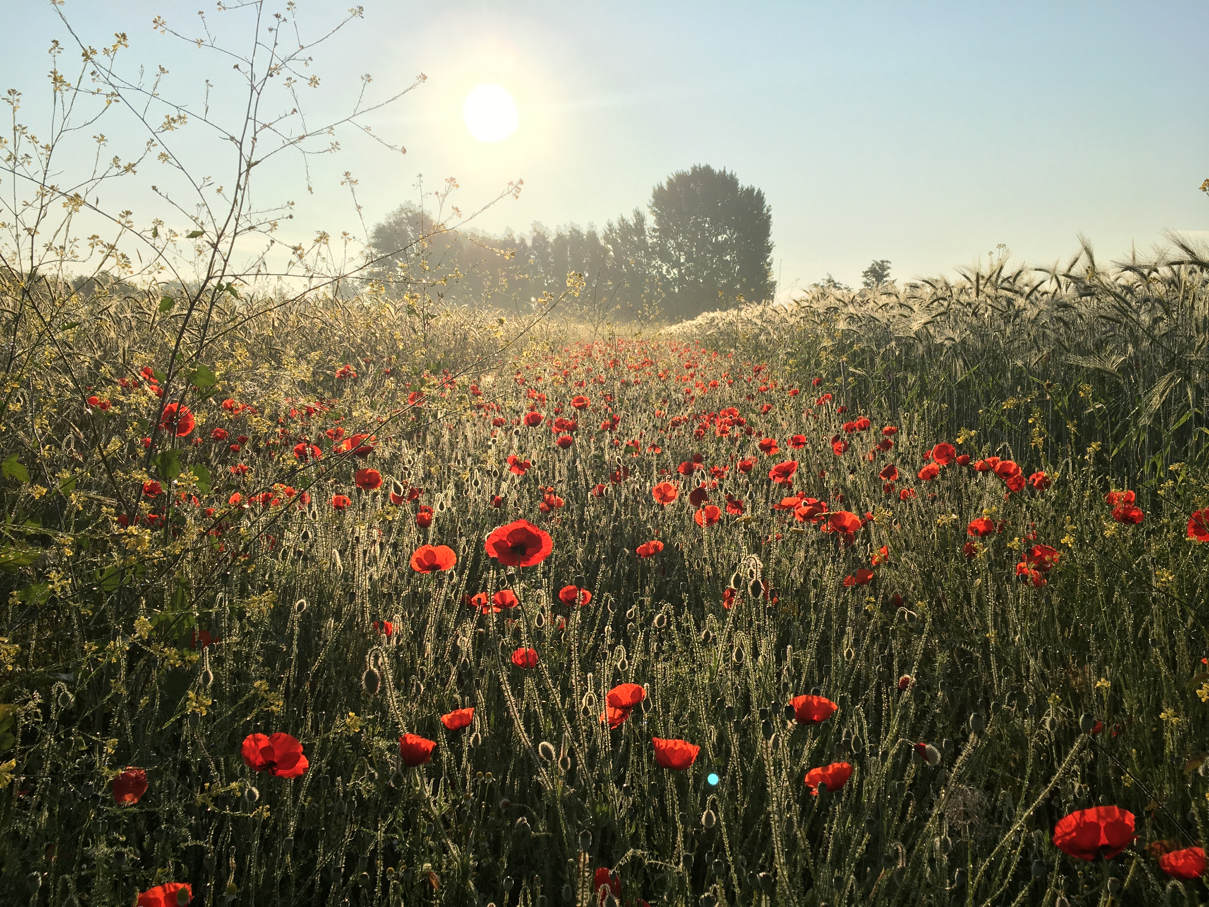 Bloeiende akkerkruiden tussen de graanakkers tijdens de zonsopkomst op Landgoed Doornik in Bemmell, Lingewaard.